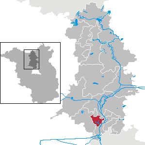 Velten in Brandenburg (Country) - District Oberhavel